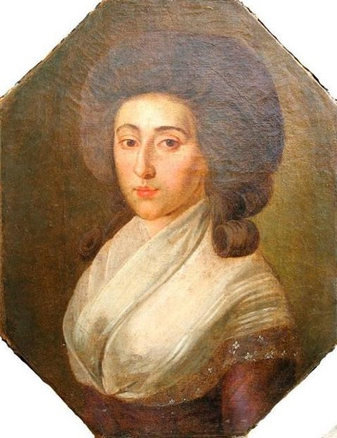 Княжна Татьяна Михайловна Голицына (1769—1840), с 1792 года замужем за князем Иваном Ивановичем Прозоровским (1769—1840).